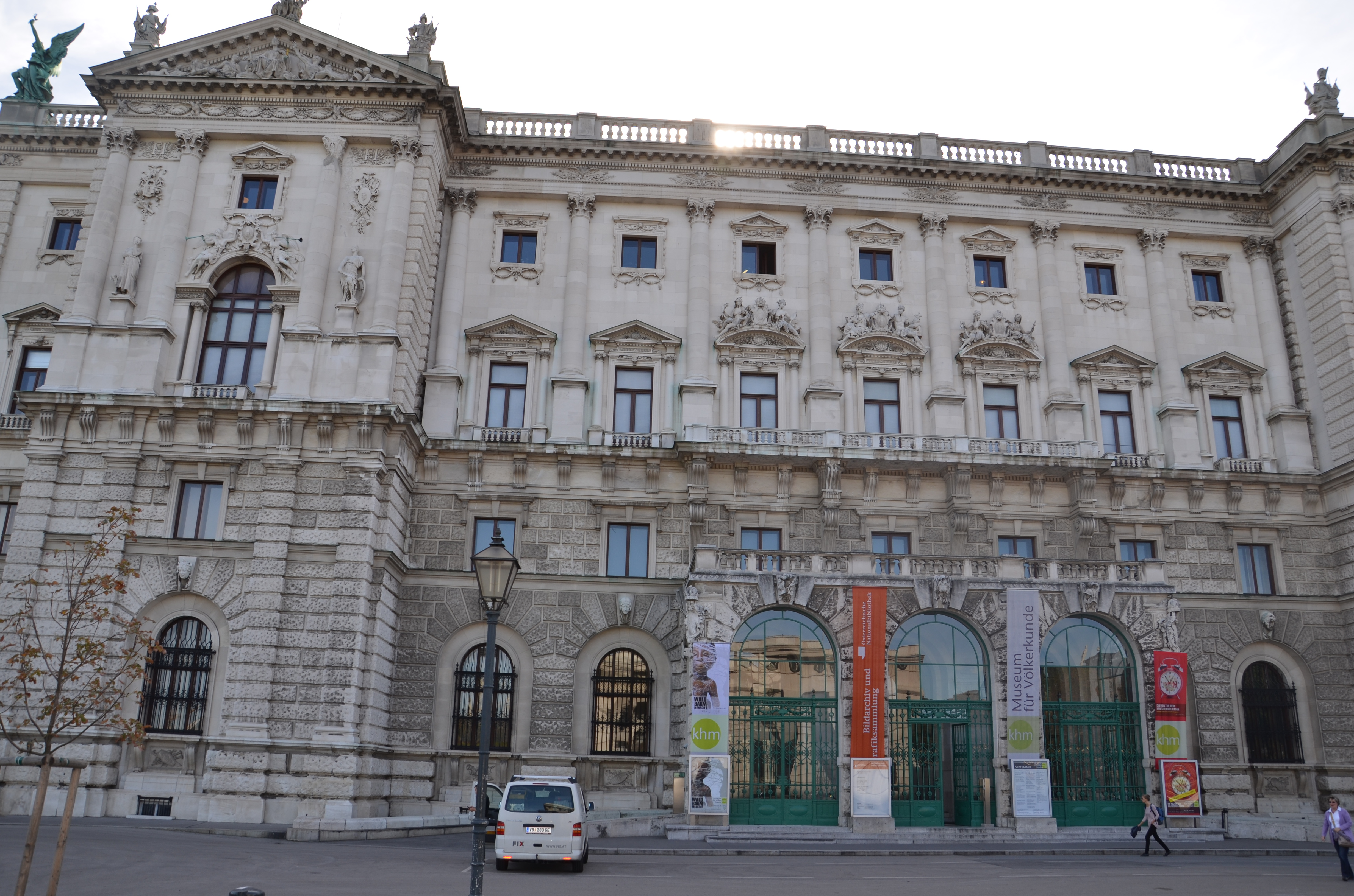 Hofburg in Wien